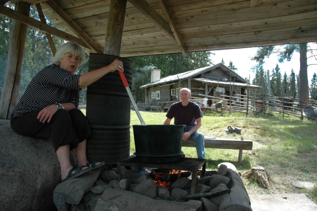 Kokar mese på Ransbysätern